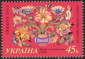 Поштова марка України 2002 з роботою Ганни Собачко-Шостак "Ваза з квітами"